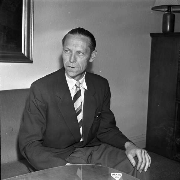 Jan-Magnus Bruheim i 1961.